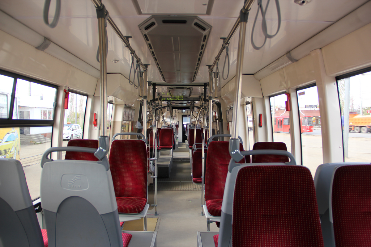 Салон трамвайного вагона АКСМ-843